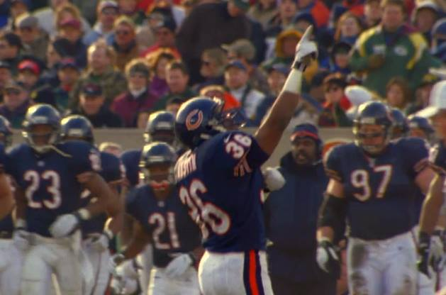 Ray Austin, Chicago Bears, 1999